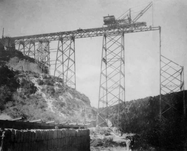 Ferrocarril de Norte de Guatemala